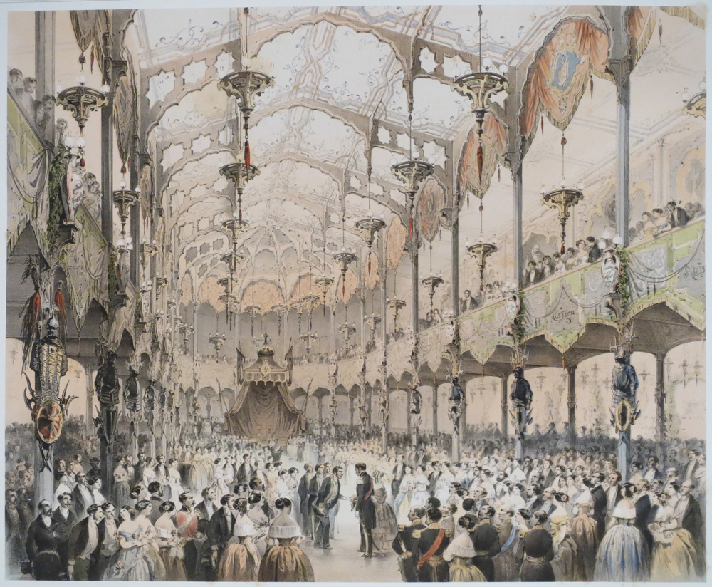 Fête donnée le 26 septembre 1848 par le Cercle Artistique et Littéraire dans la salle de la Madeleine à Bruxelles. Planche extraite de Alphonse Balat, Souvenirs de la fête donnée le 26 septembre 1848 par le Cercle Artistique et Littéraire, Bruxelles, Dero-Becker, 1849